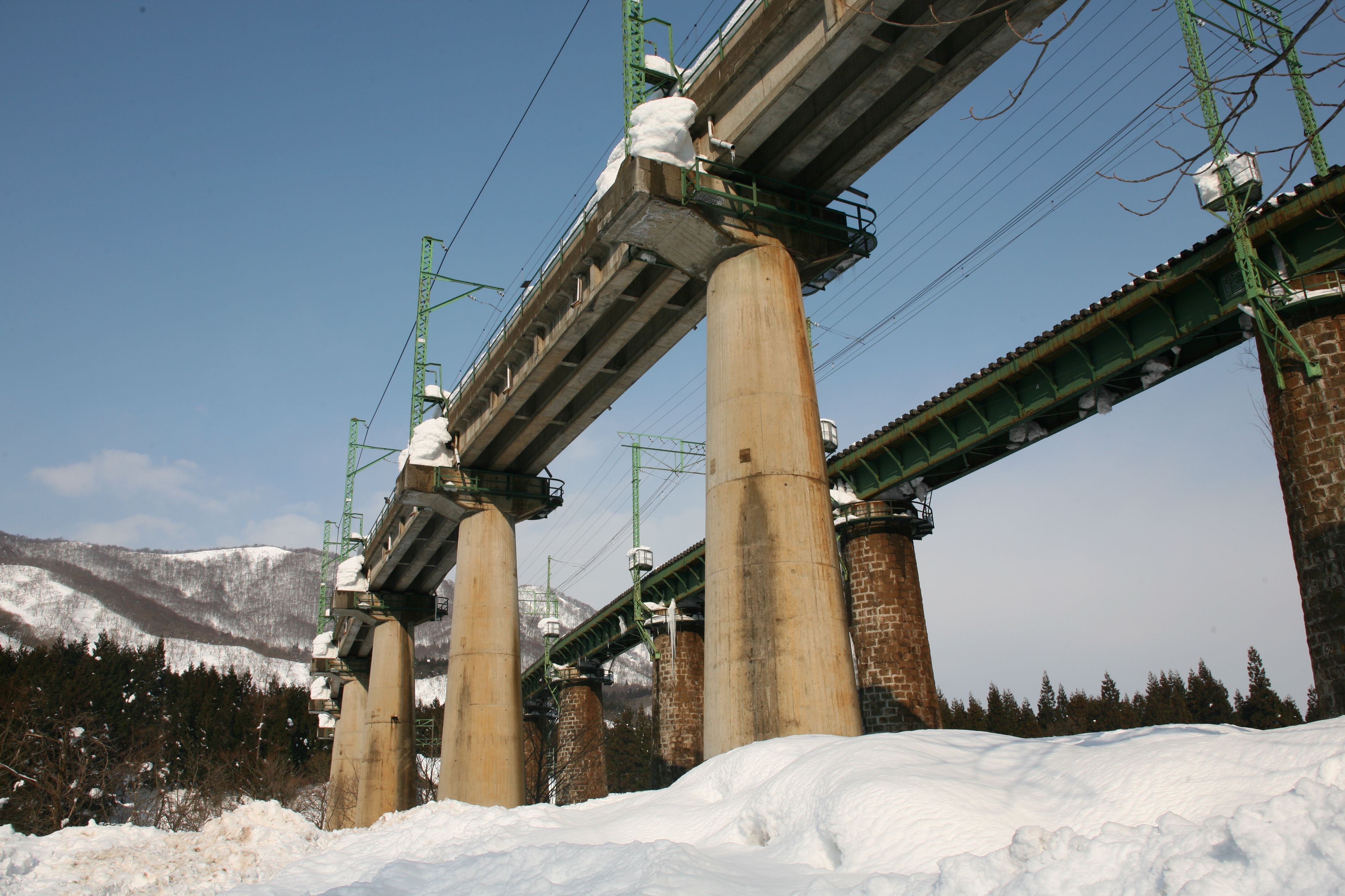 土樽駅付近の風景（新潟県南魚沼郡湯沢町土樽 ）